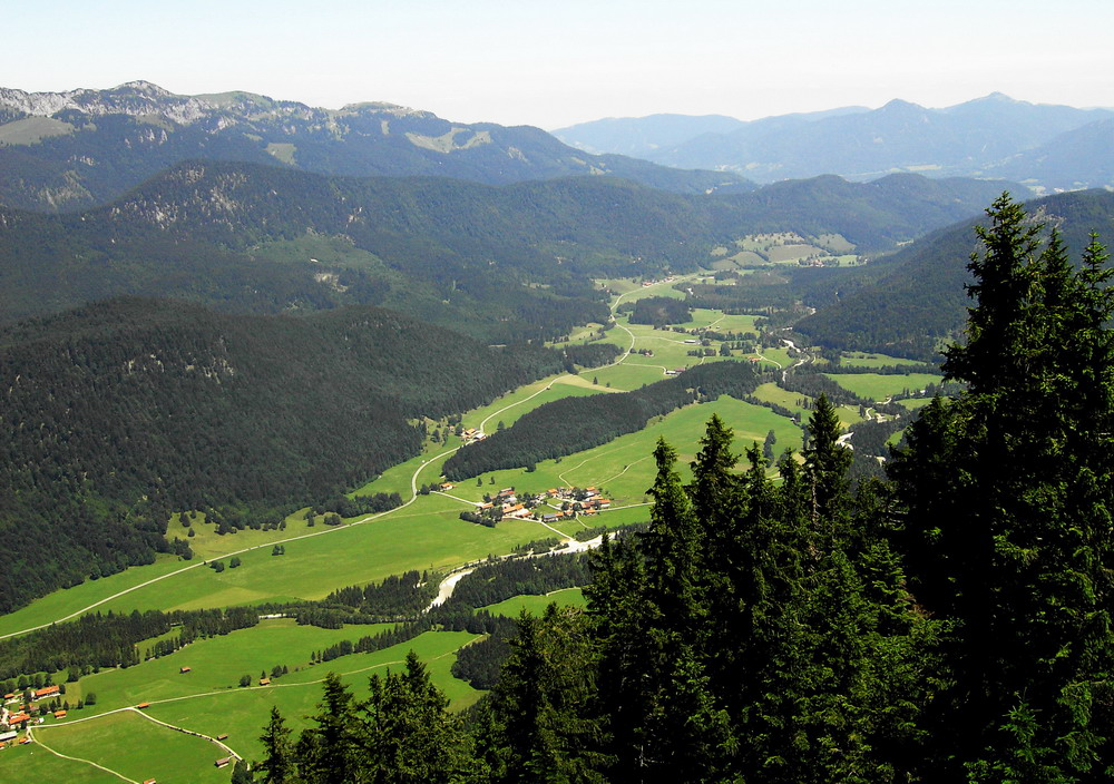 Das Untertal der Jachenau mit Brauneck links oben